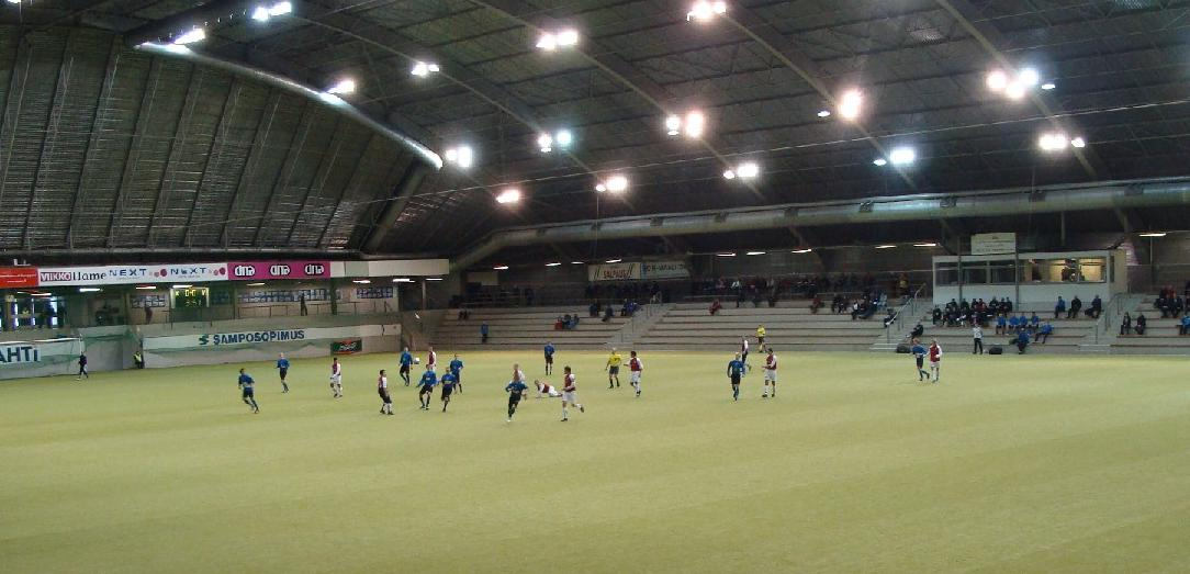 Uusi Lahti Cupin pronssiottelu 2009